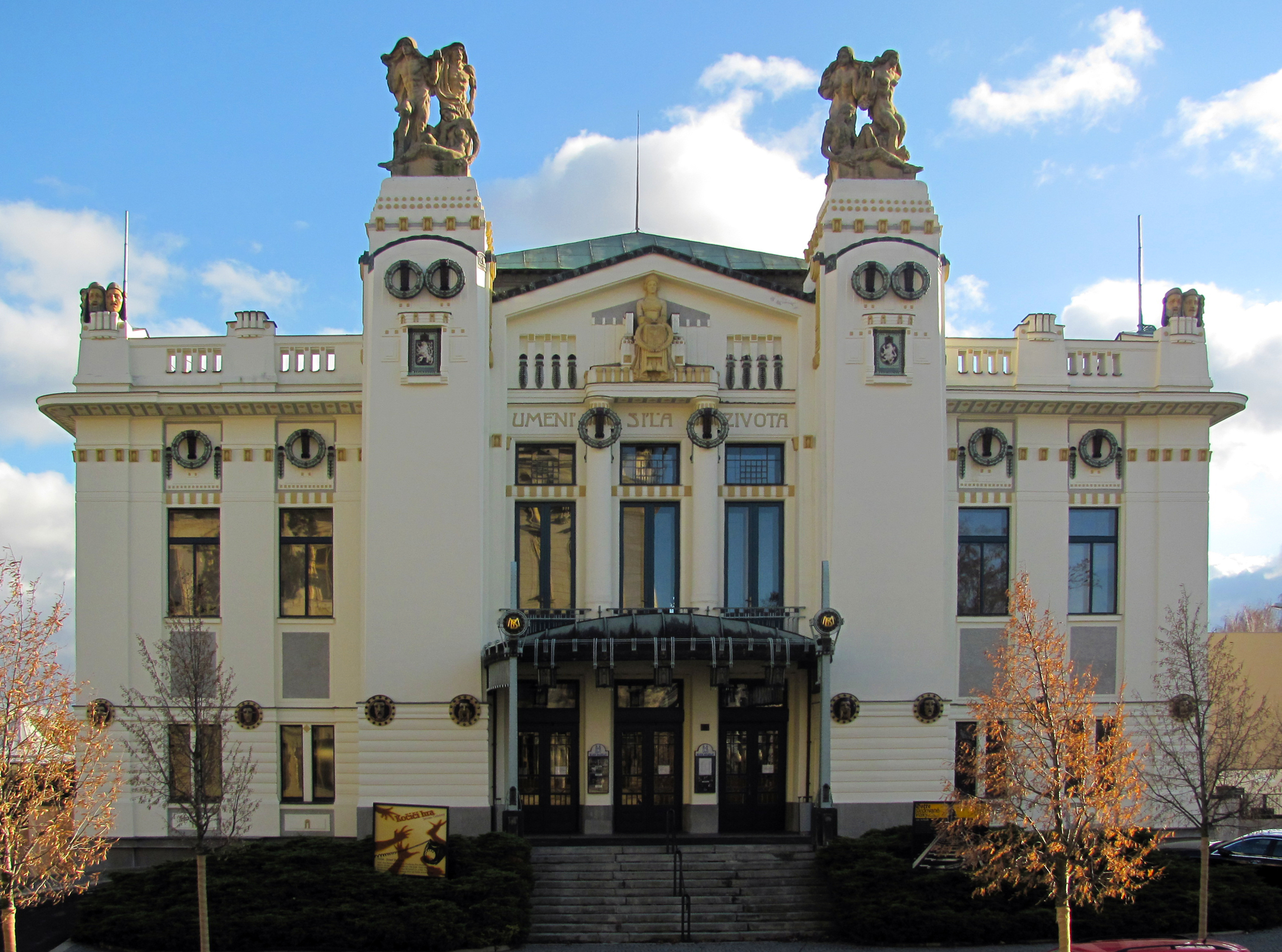 Průčelí budovy Městského divadla Mladá Boleslav postavené v roce 1909.